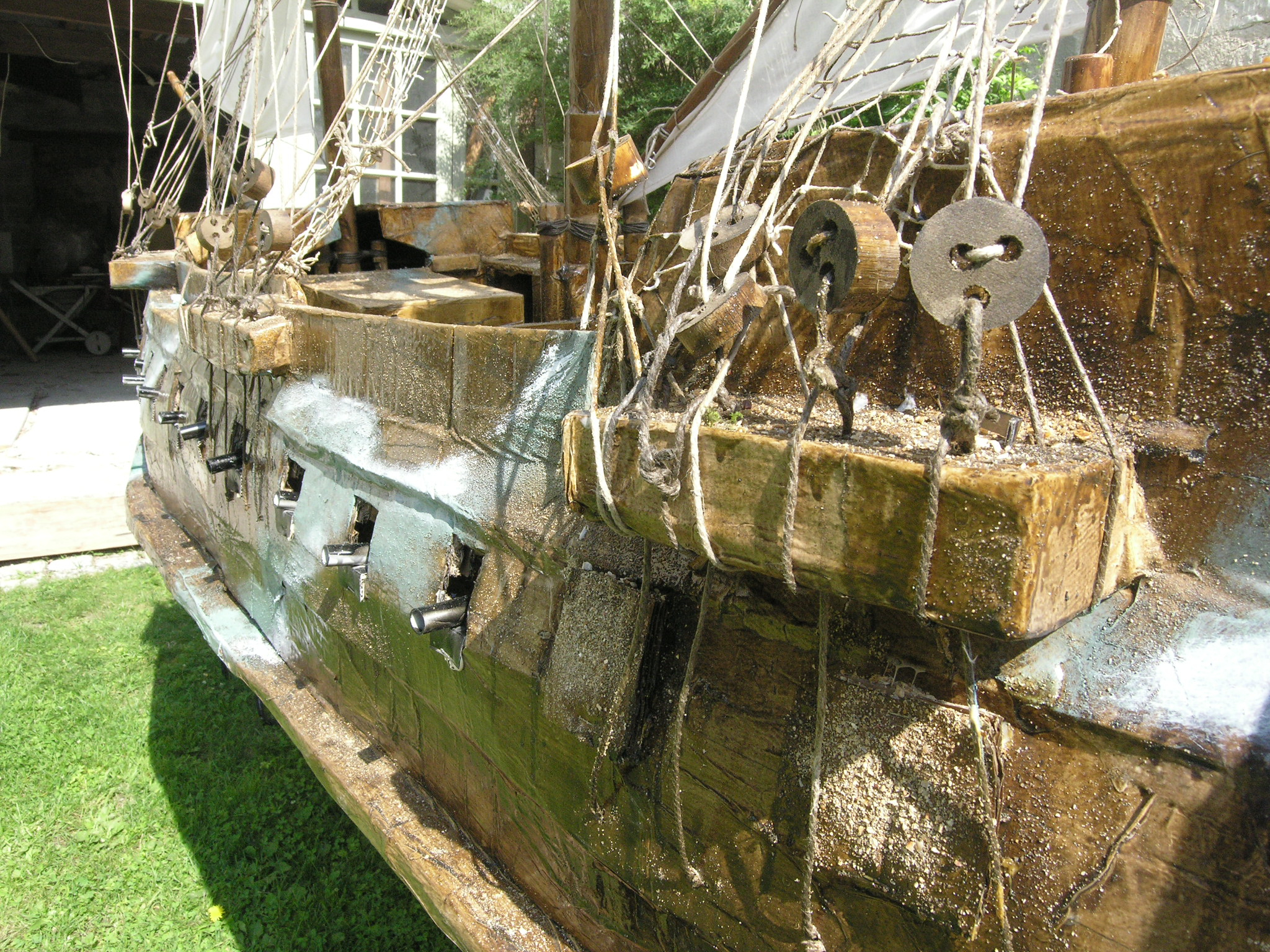 Armand Langlois (né en 1947), détail de l'Hermione, 2007, sculpture en carton, 6mx3m